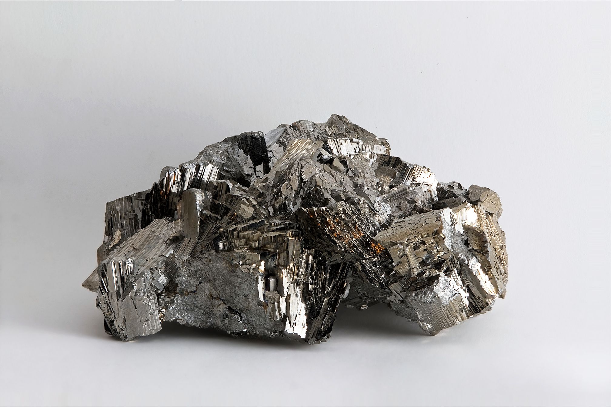 1.2 only